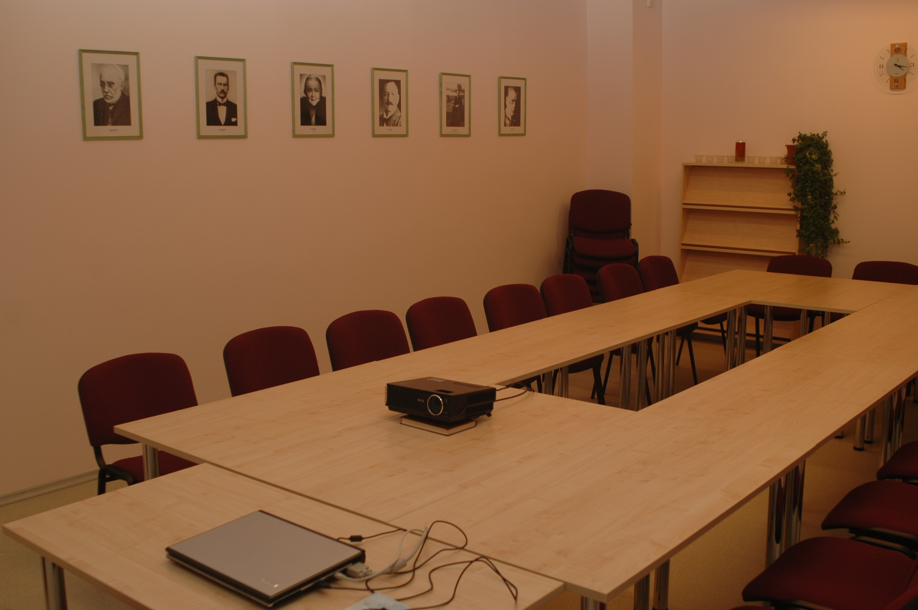 Konverentsisaal